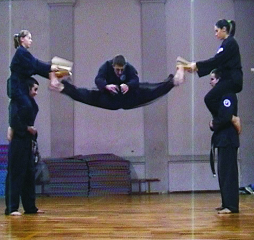 Vedran raznoška (2011)